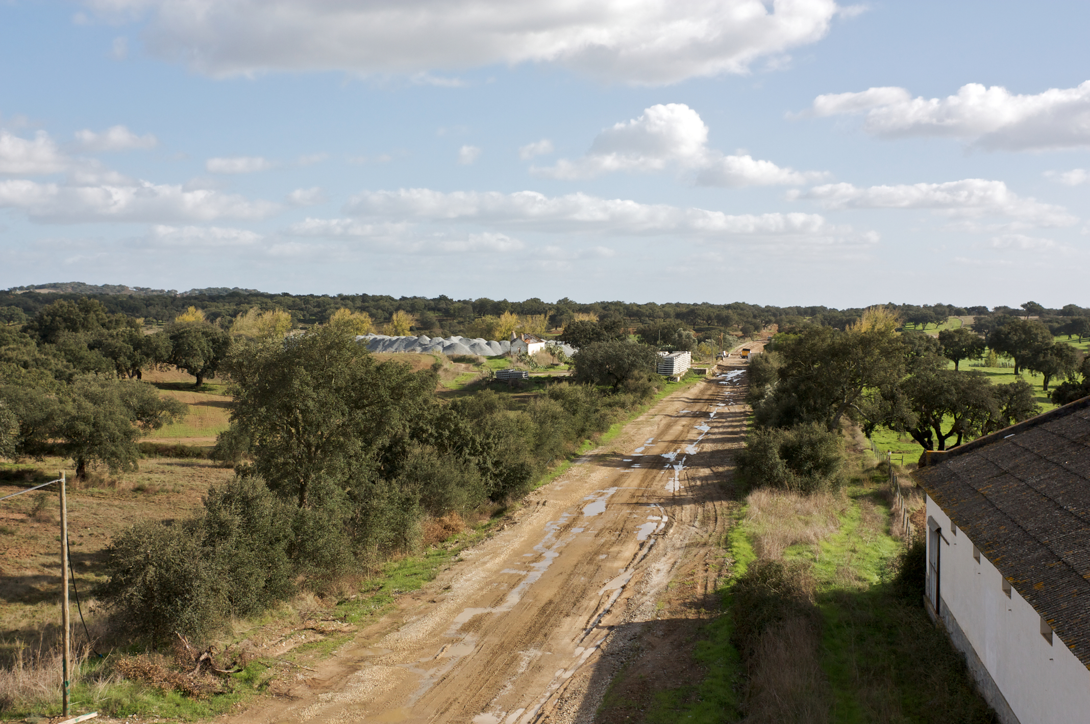 Via férrea: Linha do Alentejo [PK 83] Local: Apeadeiro de Escoural Data e hora: 17 de Novembro de 2010 [14h13] Sentido: Funcheira